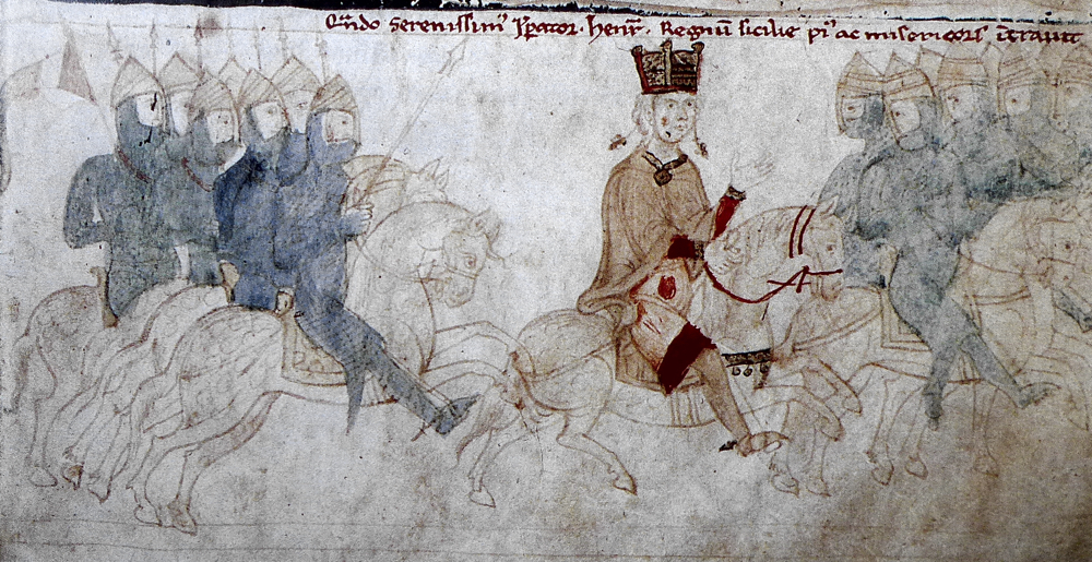 Křižáci Fridricha Barbarossy